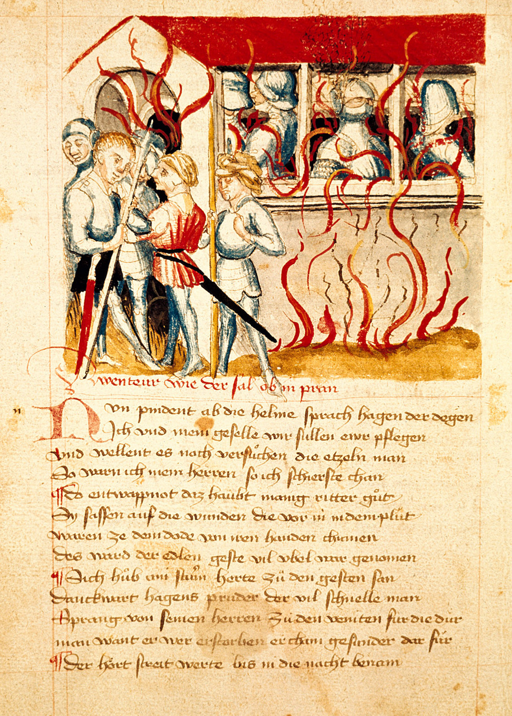 Nibelungenlied. Hundeshagenscher Kodex